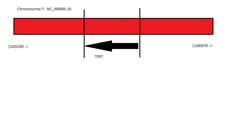 Esquema seqüència gènica determinant hTERT